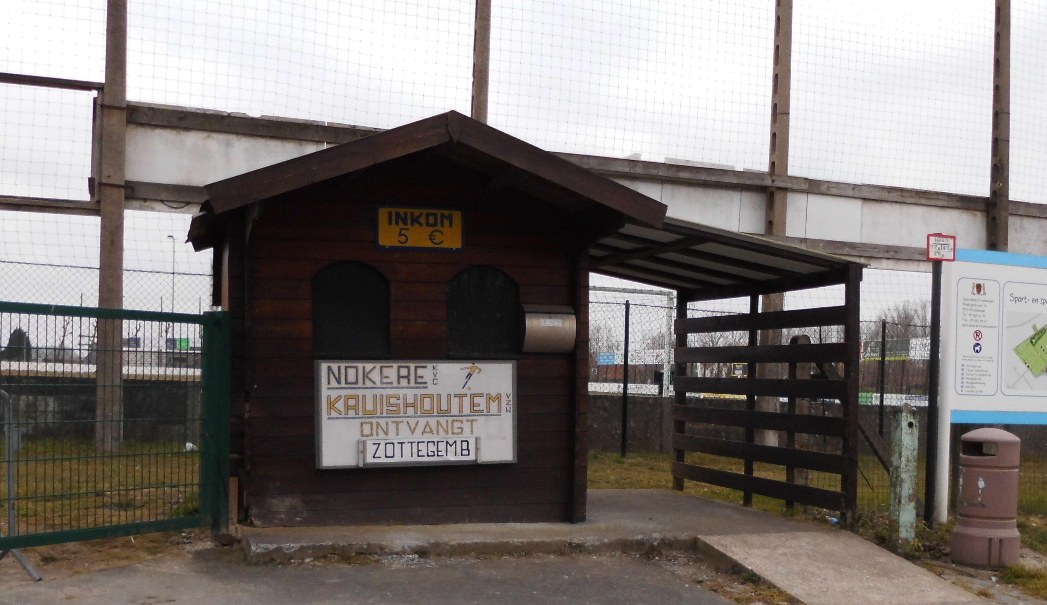 Ticketbalie van de voetbalclub Nokere-Kruishoutem - KBVB stamnummer 3246 - Kerkakkers - Kruishoutem - Oost-Vlaanderen - België